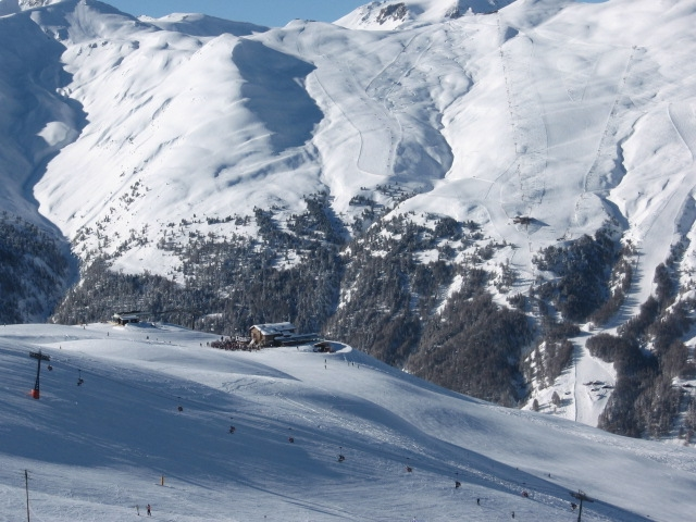 נוף מושלג באתר הסקי ליביניו